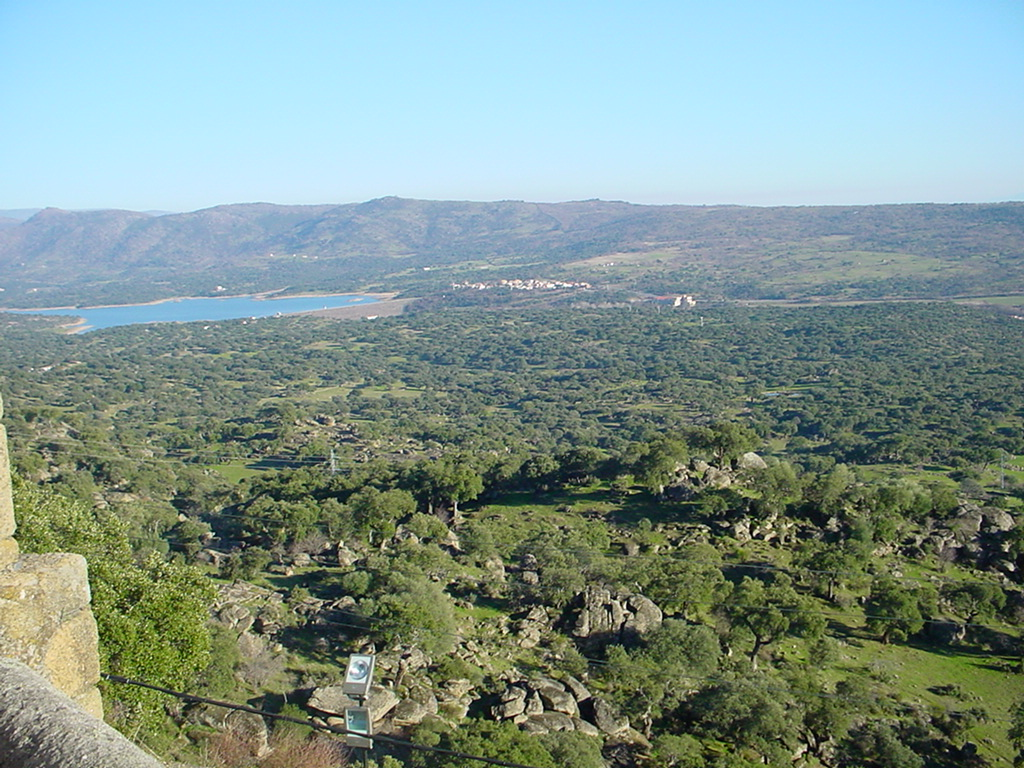 Vista de Valcorchero desde la ermita del Puerto